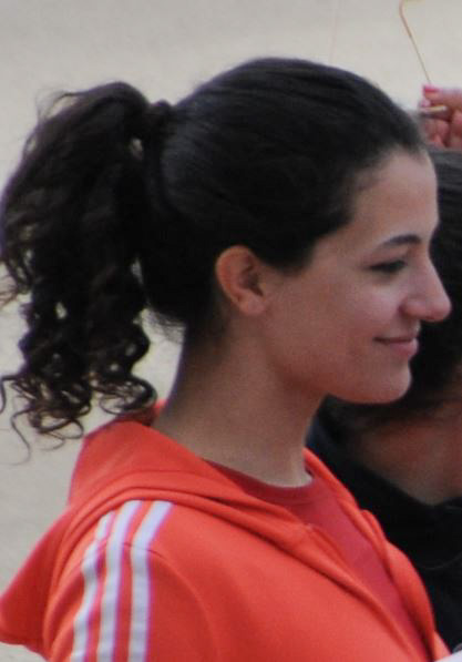 La perchiste tunisienne Dorra Mahfoudhi au stade d'athlétisme de Radès